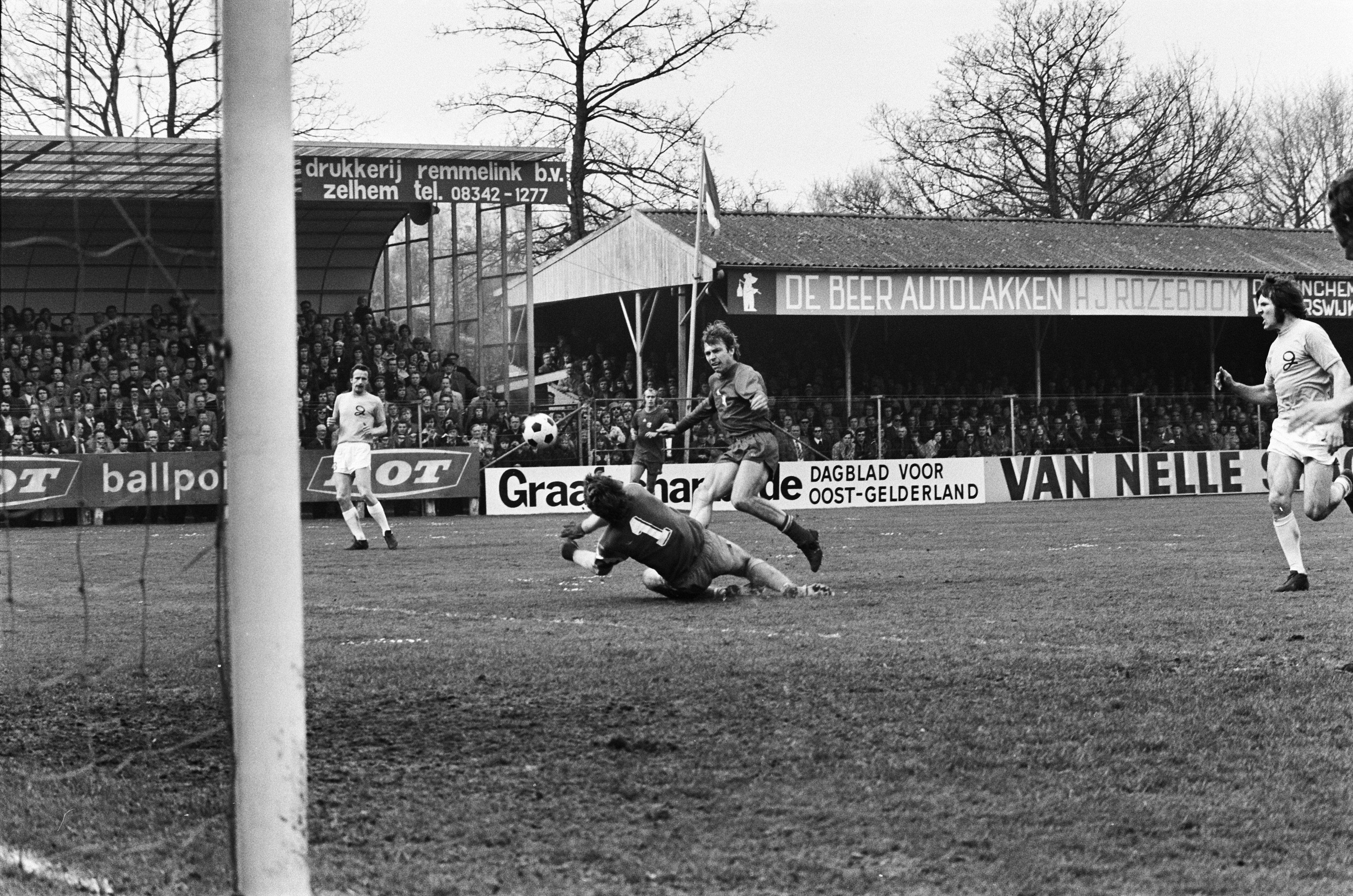 Collectie / Archief : Fotocollectie Anefo Reportage / Serie : [ onbekend ] Beschrijving : De Graafschap tegen Ajax 0-0, Jan Mulder in duel met de doelman Van Zoghel van De Graafschap, rechts Roel Zaaijer Datum : 20 april 1975 Trefwoorden : sport, voetbal Persoonsnaam : Mulder, Jan, Zaaijer, Roel, Zoghel, Nico van Fotograaf : Peters, Hans / Anefo Auteursrechthebbende : Nationaal Archief Materiaalsoort : Negatief (zwart/wit) Nummer archiefinventaris : bekijk toegang 2.24.01.05 Bestanddeelnummer : 927-8829